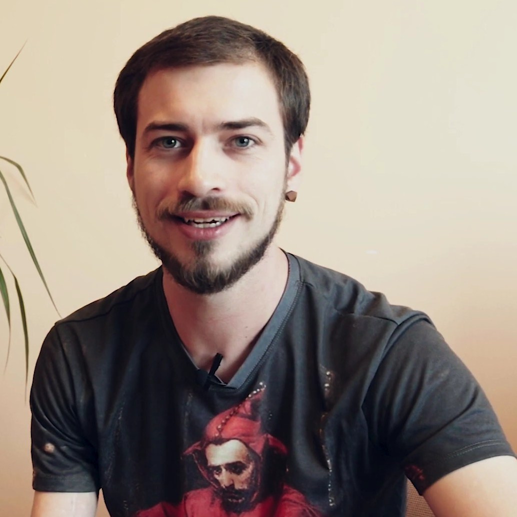 Jasiek Mela (ur. 1988), podróżnik i działacz społeczny.